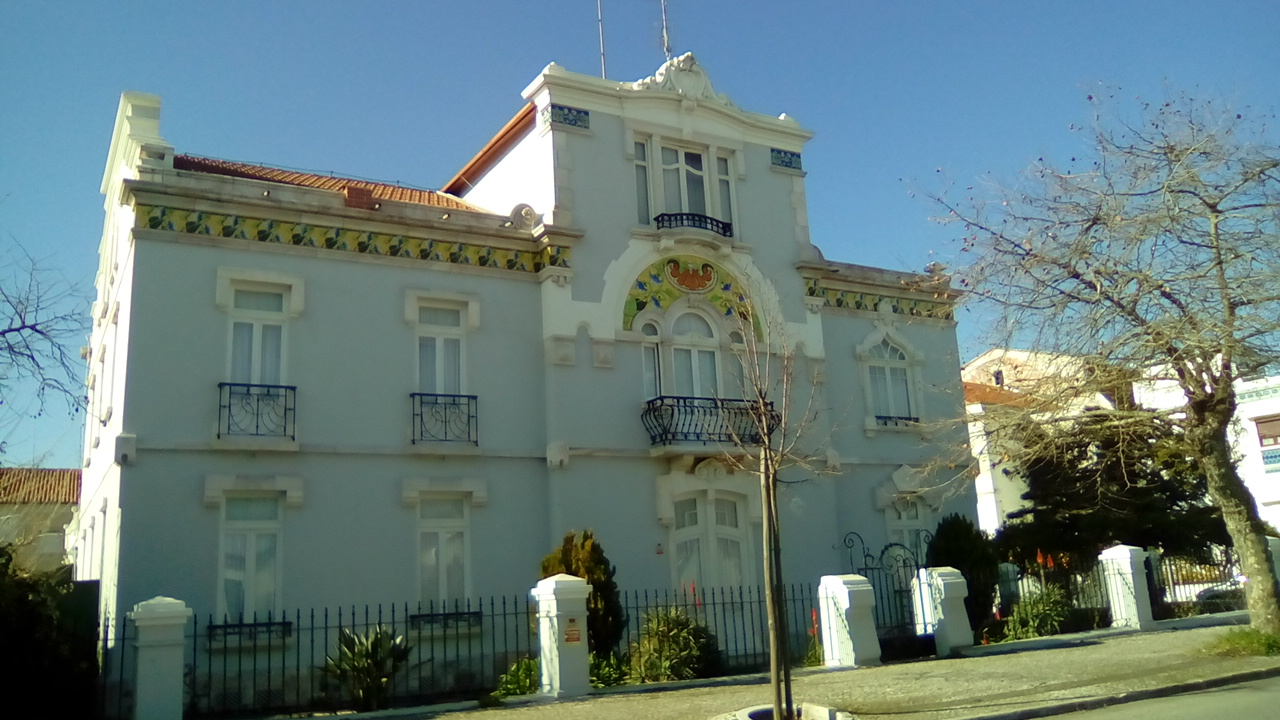 Palacete Vieira da Silva - Fachada frontal